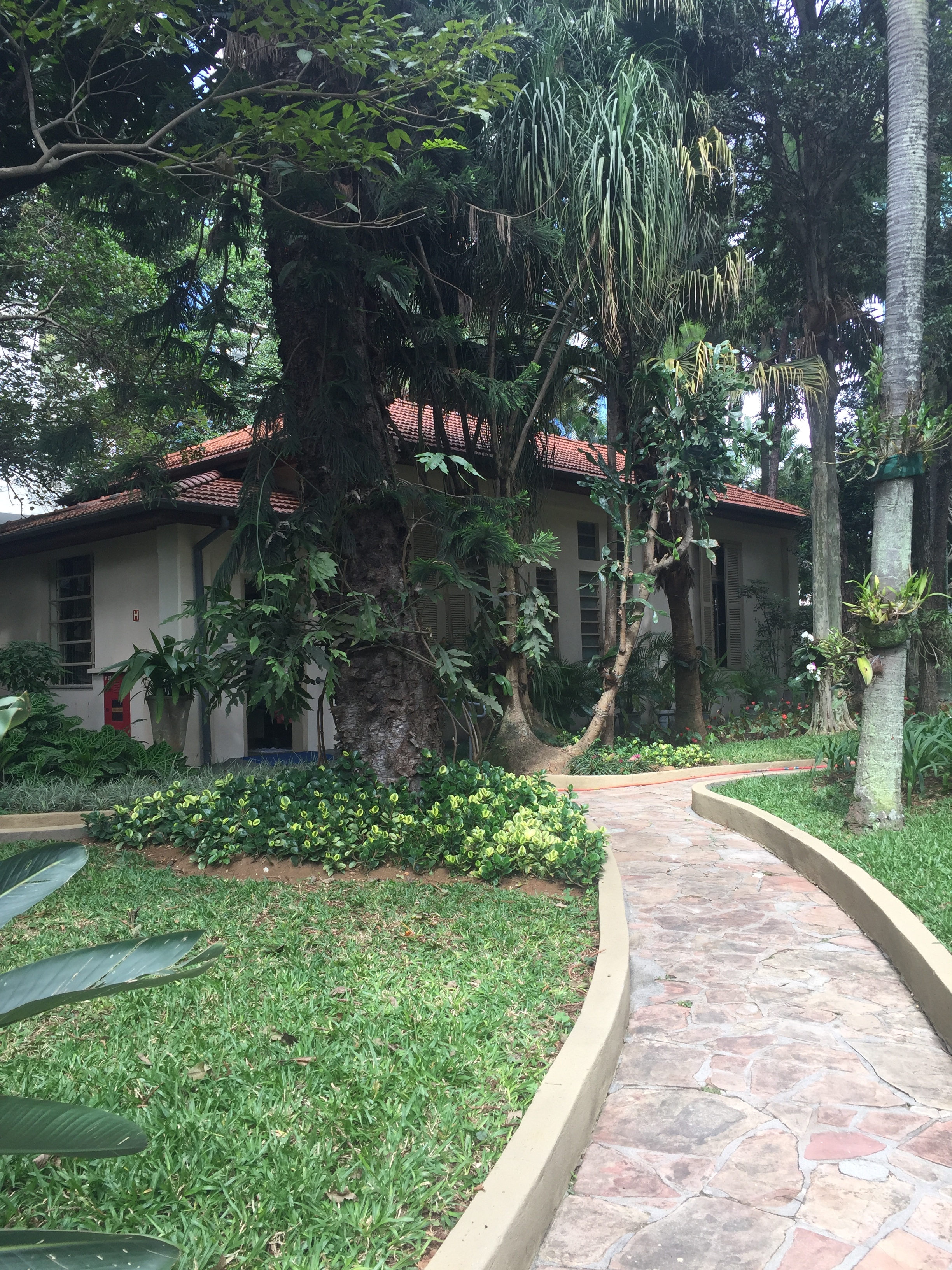 Visão geral do Acervo Histórico Irmã Beata Heinrich, em São Paulo (SP), Brasil.